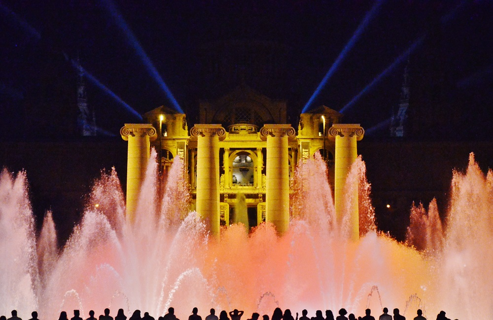 Font Màgica (Barcelona)